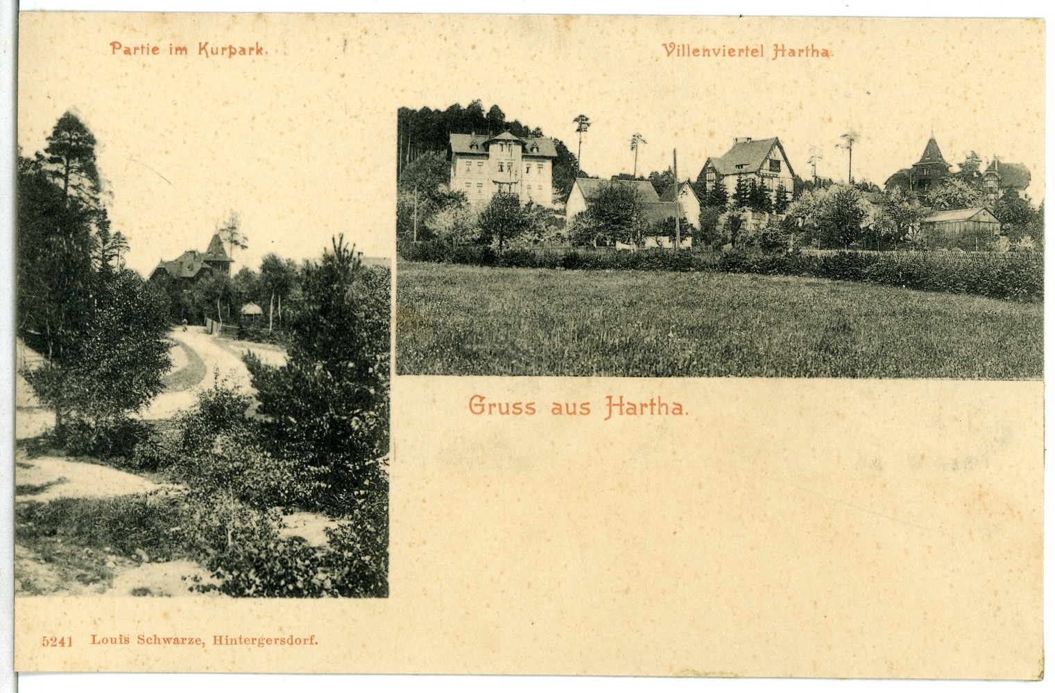 Hartha; Im Kurpark - Villenviertel This postcard is from publisher Brück & Sohn in Meißen ( postcard has a unique number 05241 and is available in a higher resolution at the publisher. This images was uploaded in a cooperation project between Wikipedians and the publisher.